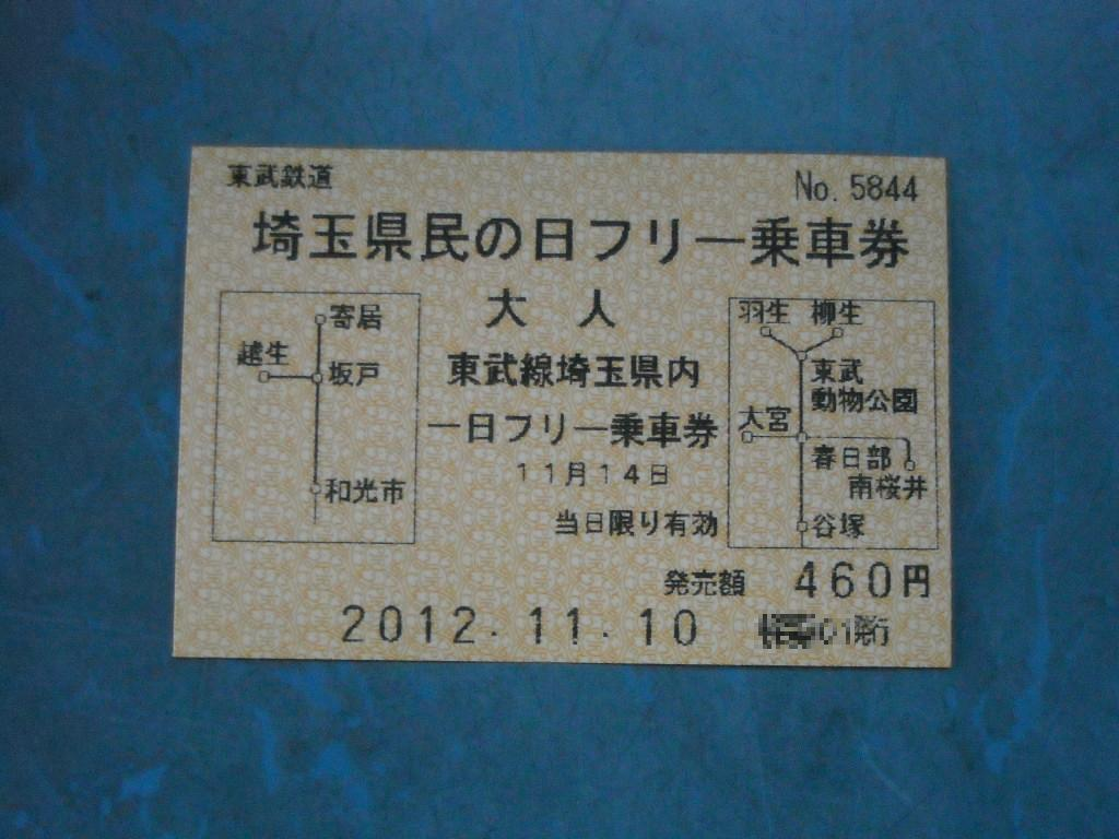 東武鉄道版埼玉県民の日フリー乗車券。2012年11月14日